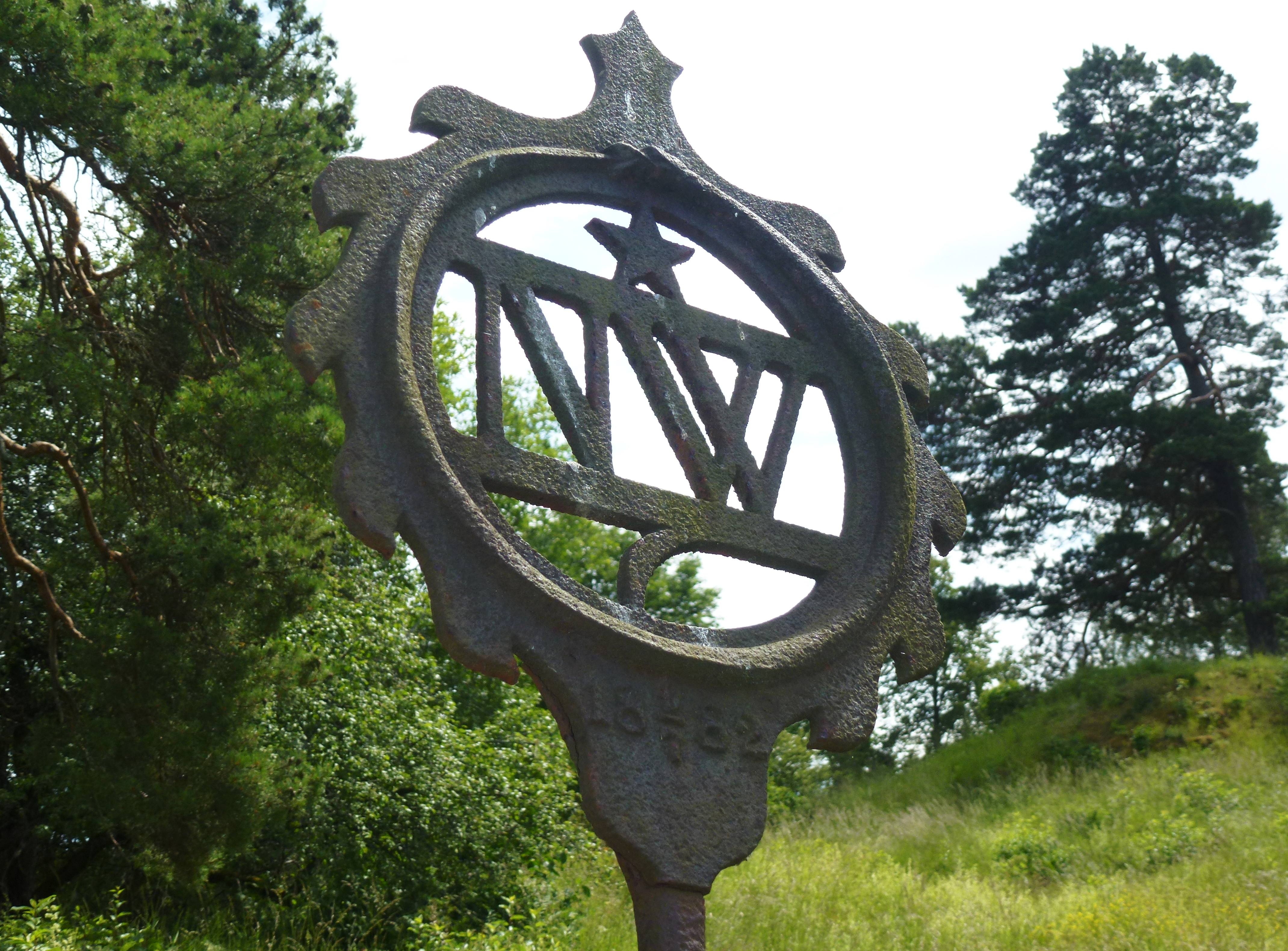 Vid Biskopsborgen: järnemblem fastsatt i en järnstång, uppsatt av ”Nordens Wänner”1882. Tidigare fanns här ytterligare ett järnemblem, uppsatt av ”Föreningen Fornvännen” (Raä Kungsängen 118:1).